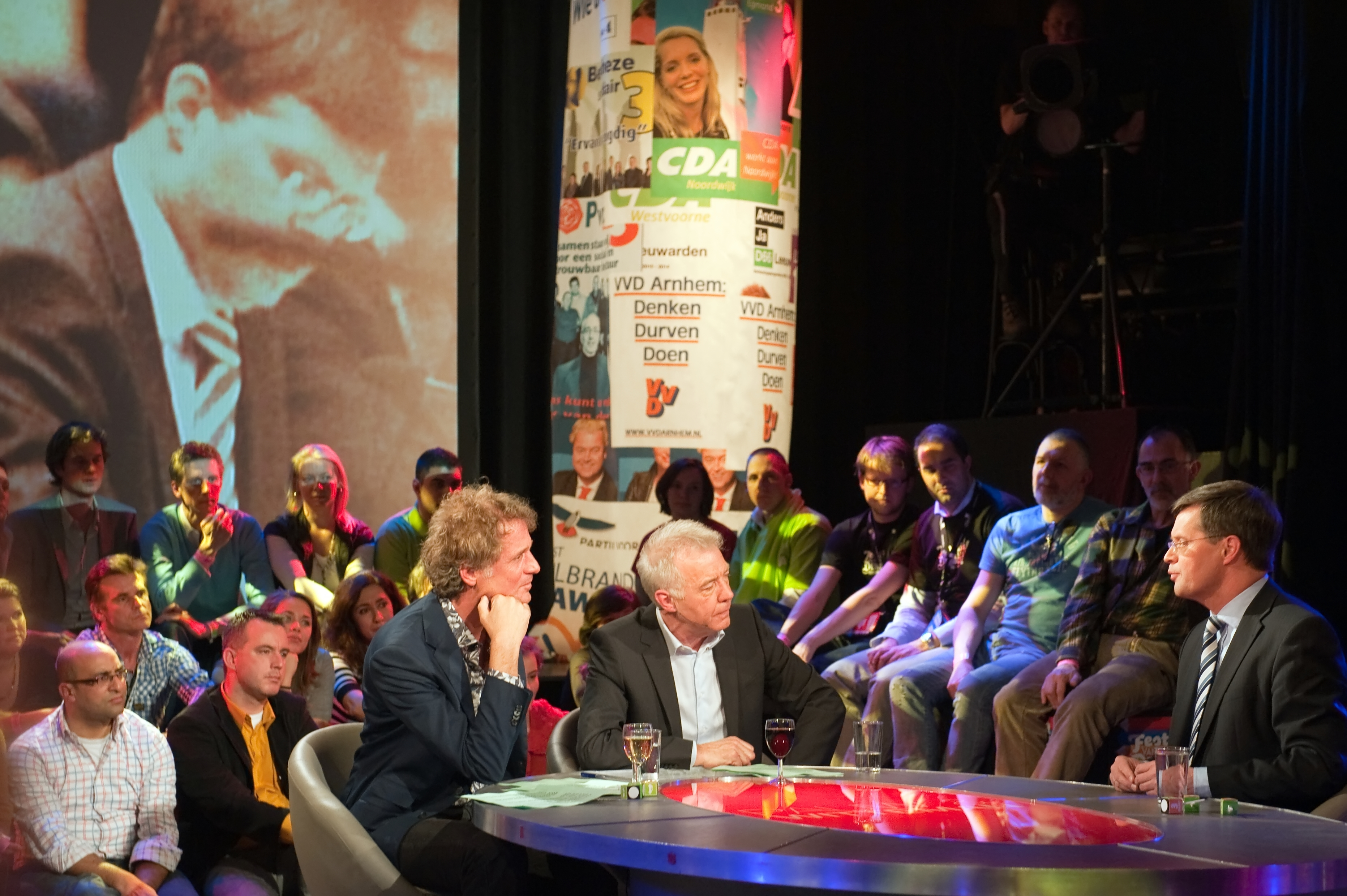 festival van de lokale democratie